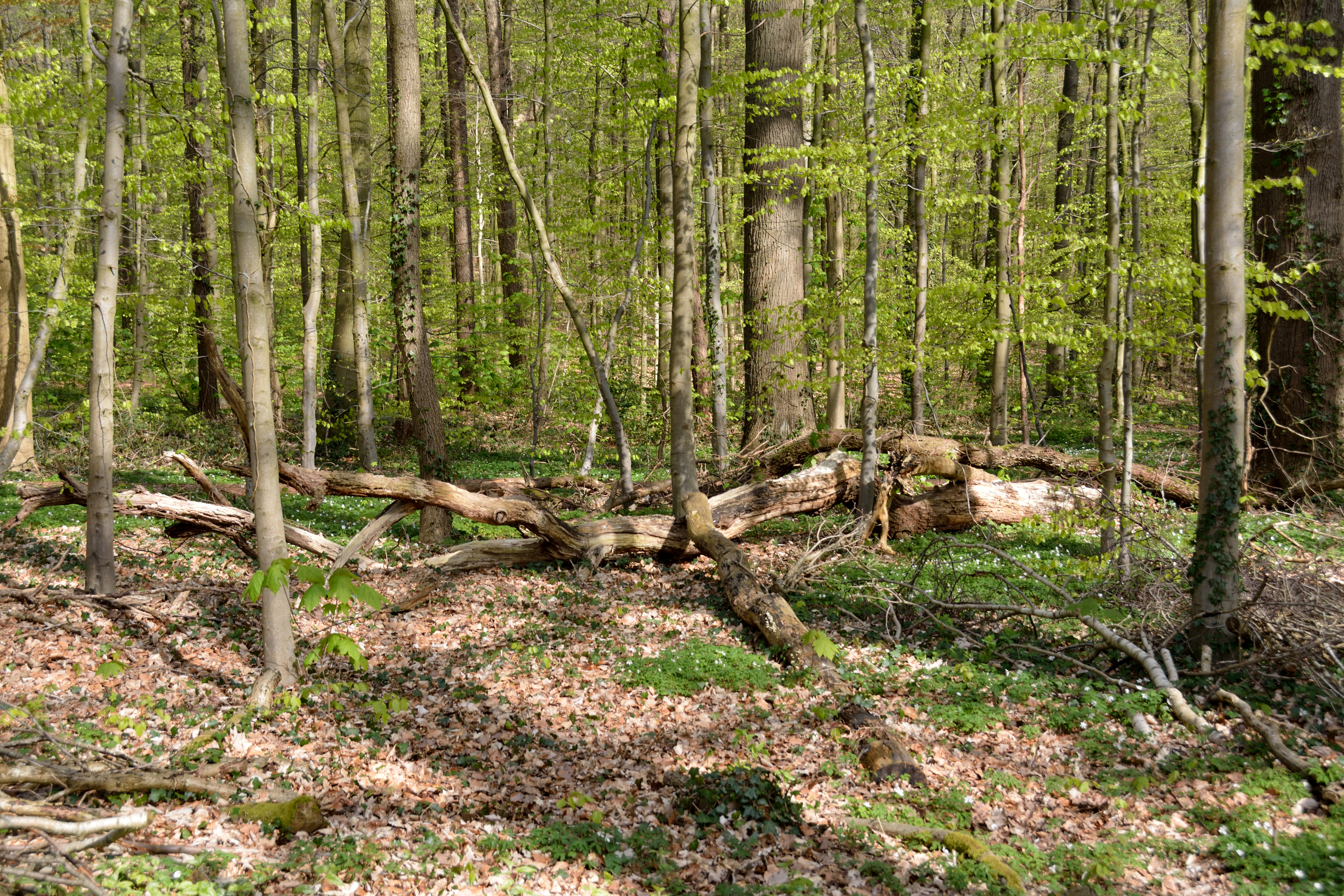 Der Kreis Steinburg hat mehrere Flächen unter dem gemeinsamen Namen "Landschaftsbestandteile und Landschaftsteile im Bereich mehrerer Gemeinden" zusammengefasst. Dieses Foto wurde in der „Waldfläche Lehmwohld“ in Itzehoe aufgenommen, es ist das Teilstück Nr. 1.